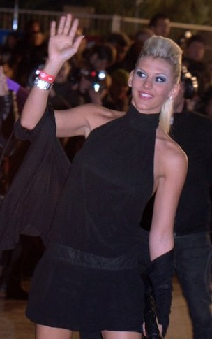 Amélie, candidate à la saison 4 de Secret Story, aux NRJ Music Awards.